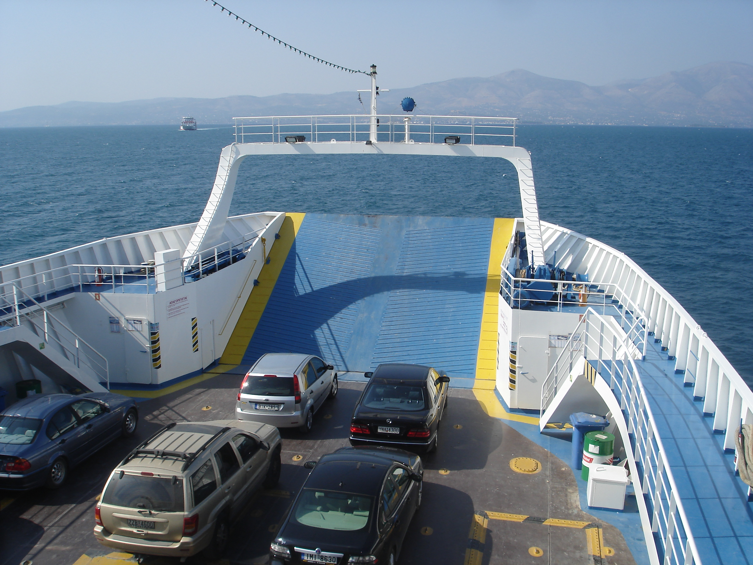 Ferry-boat entre Erétrie et Oropos au centre de l'ile d'Eubée (Grèce).